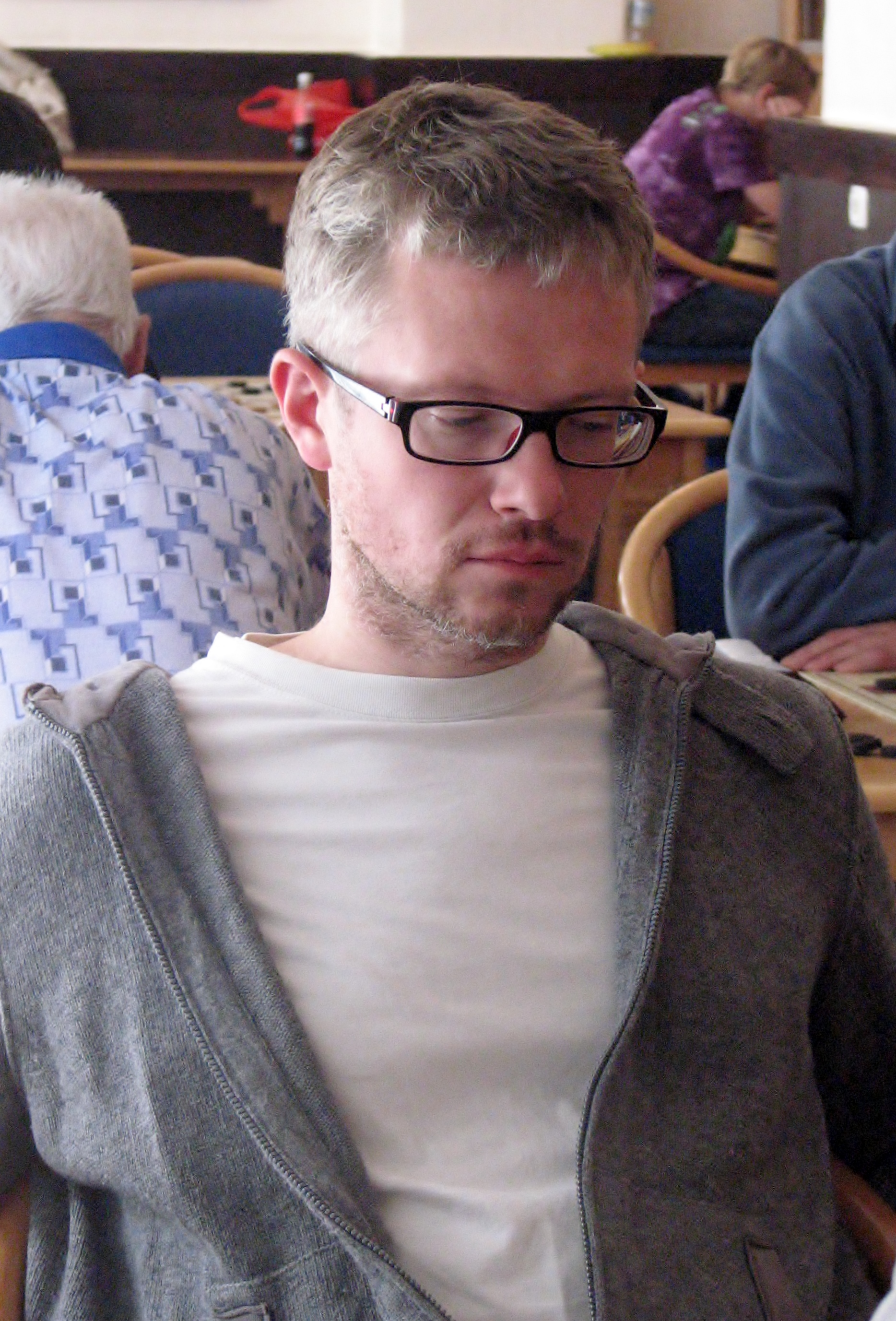 Janek Mäggi mängimas Eesti meistrivõistlustel 64-ruudulises kiirkabes